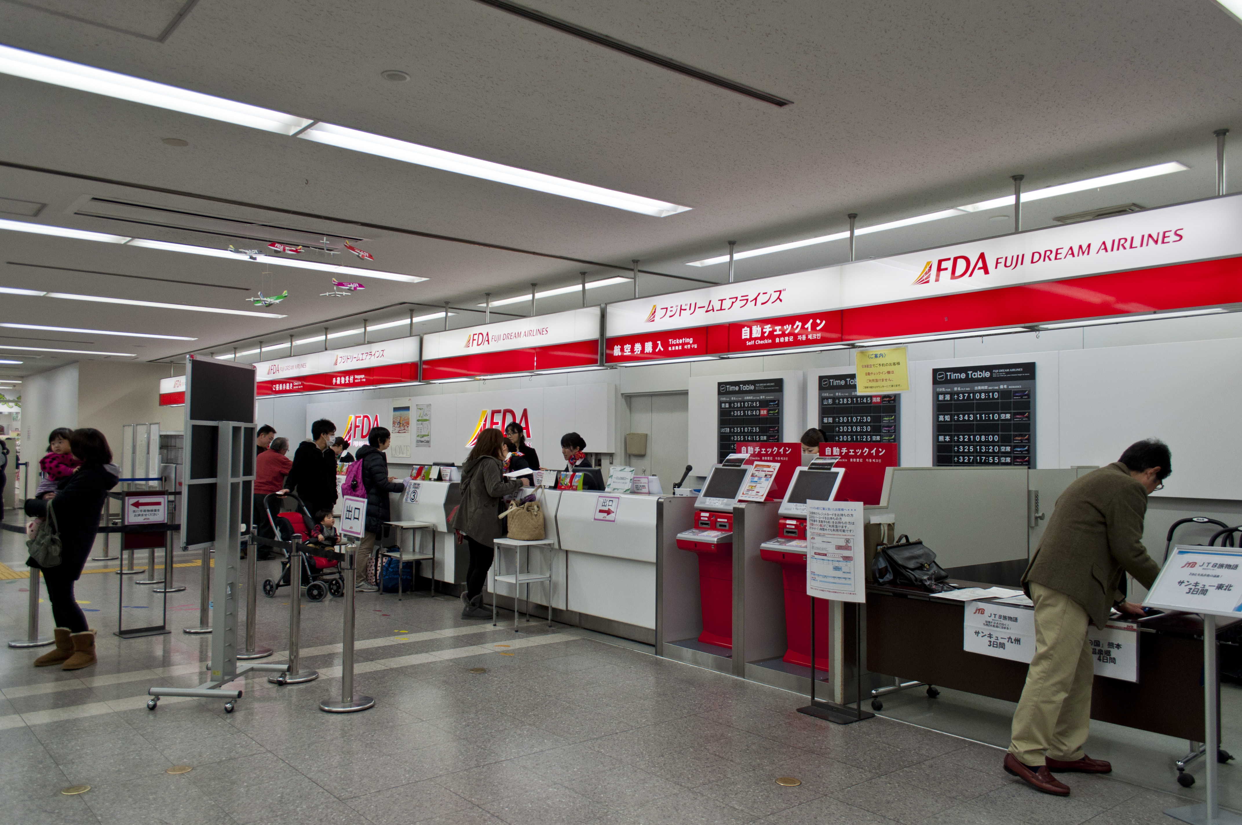 県営名古屋空港（名古屋/小牧）におけるFDAのチェックインカウンター